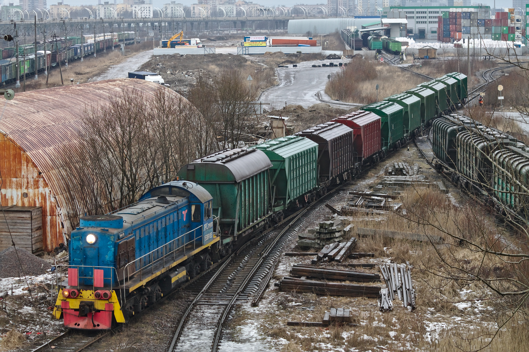 Тепловоз ТЭМ2-1375 с поездом, подъездные пути к станции Предпортовая. см. фото 582681 в альбоме автора